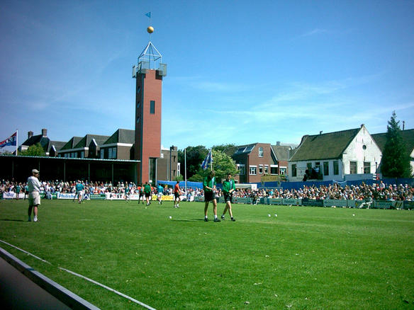 Kaatsen op de PC in Franeker